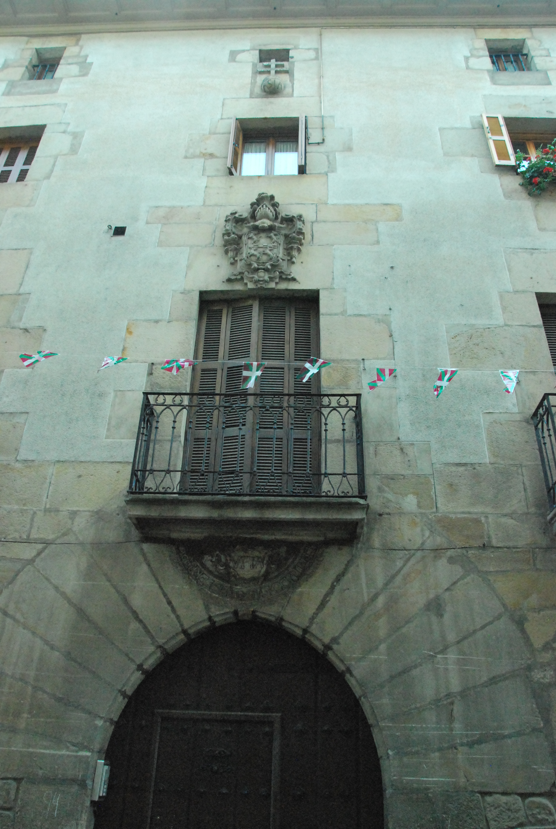 Oñatiko Zubiarre jauregiaren aurrekaldea